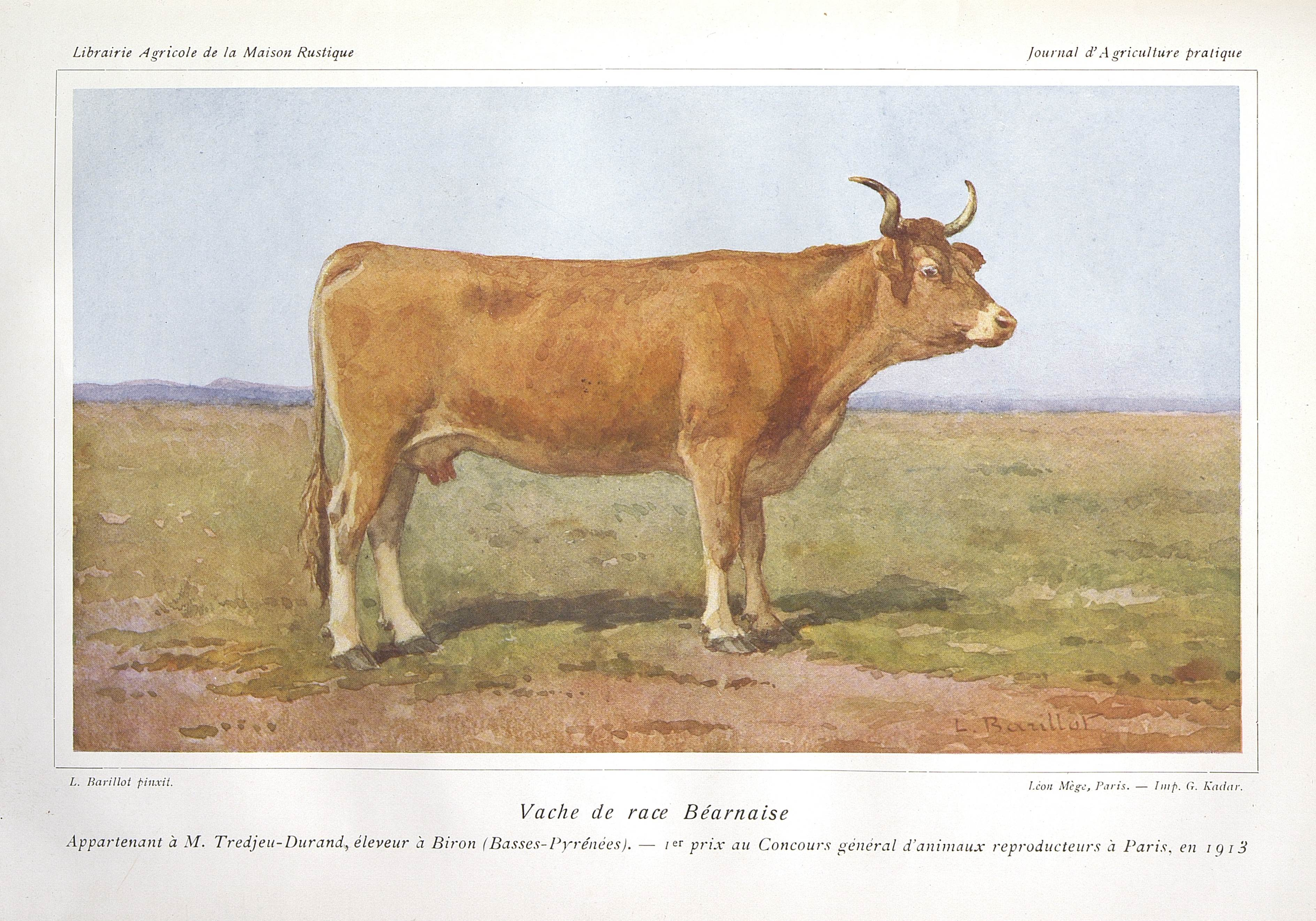 Illustration issue de l'article "La race bovine Béarnaise", H. de Lapparent, Journal d'agriculture pratique, de jardinage et d'économie domestique, Paris, Librairie agricole de la maison rustique, 1914, tome 2, p. 216-217. Ouvrage appartenant à la Bibliothèque historique du ministère de l'Agriculture, déposée à la MRSH Caen. Fichier : UNICAEN_MRSH_Bovin_JAP_1914_2_216